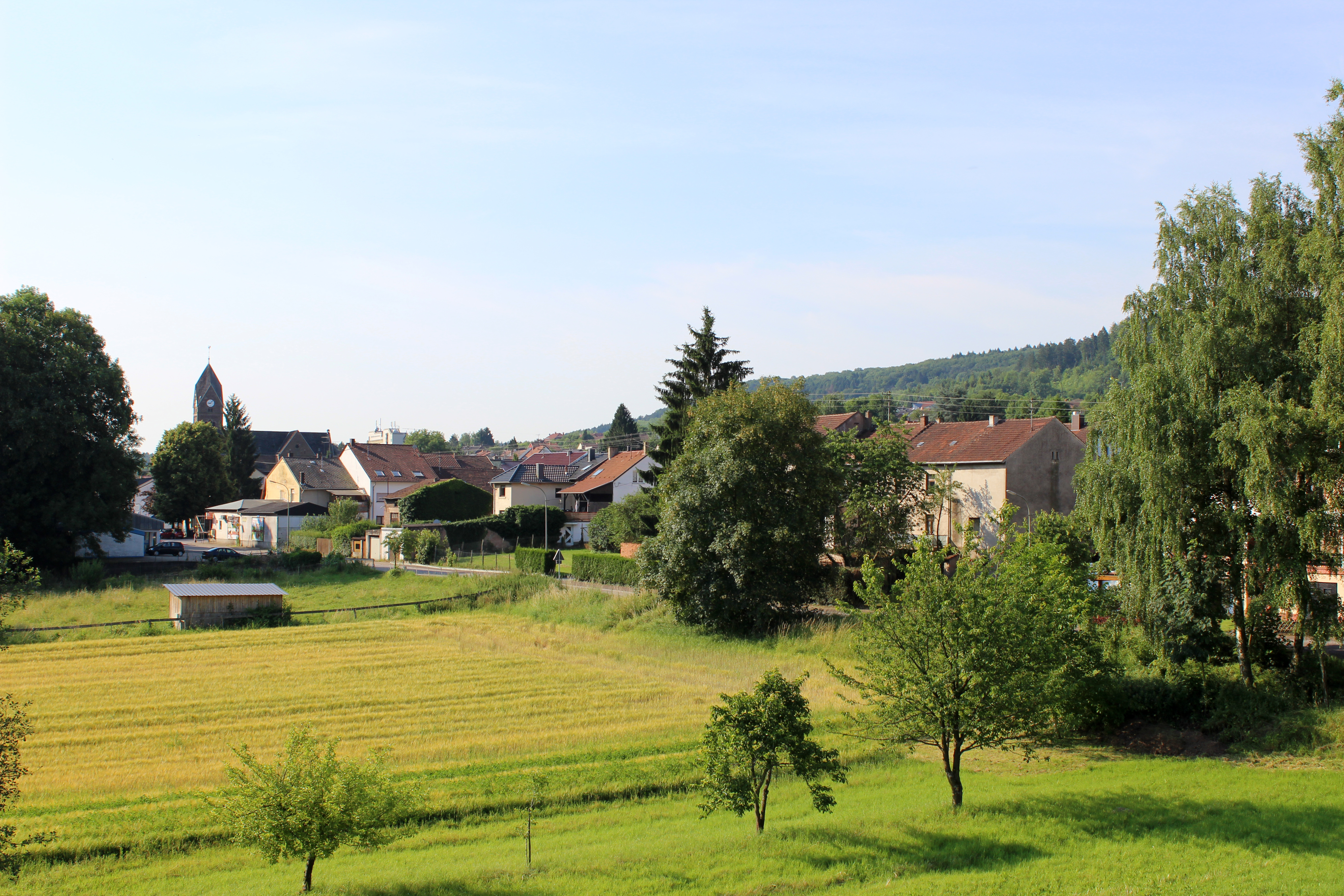 Blick auf Fremersdorf, einem Ortsteil der Gemeinde Rehlingen-Siersburg, Landkreis Saarlouis, Saarland